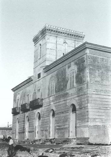 Tonnara ad Alcamo Marina, nei pressi dell'odierna stazione di Castellammare del Golfo